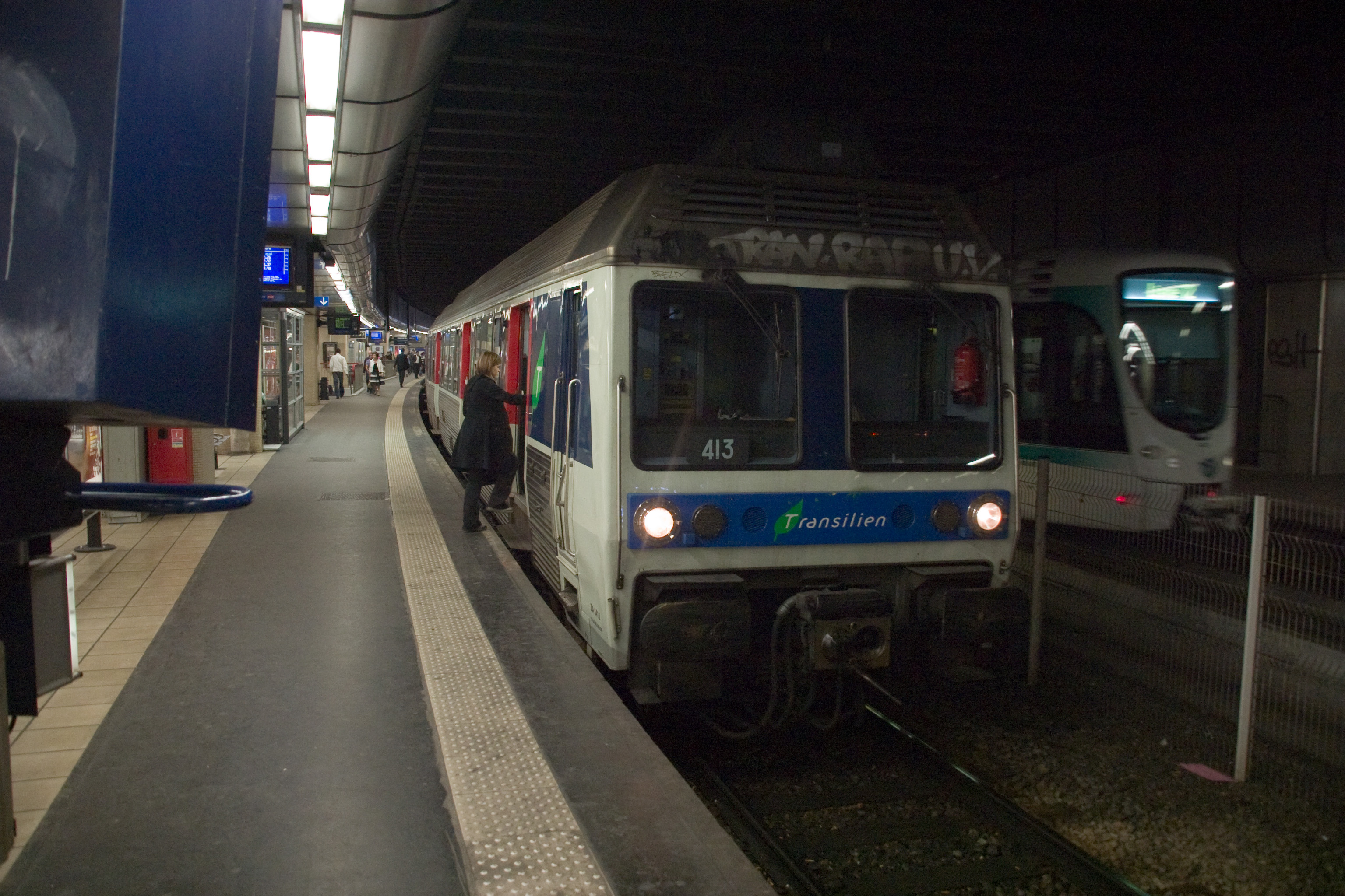 Train à quai dans la gare de La Défense (Zone SNCF - Transilien) - La Défense - France